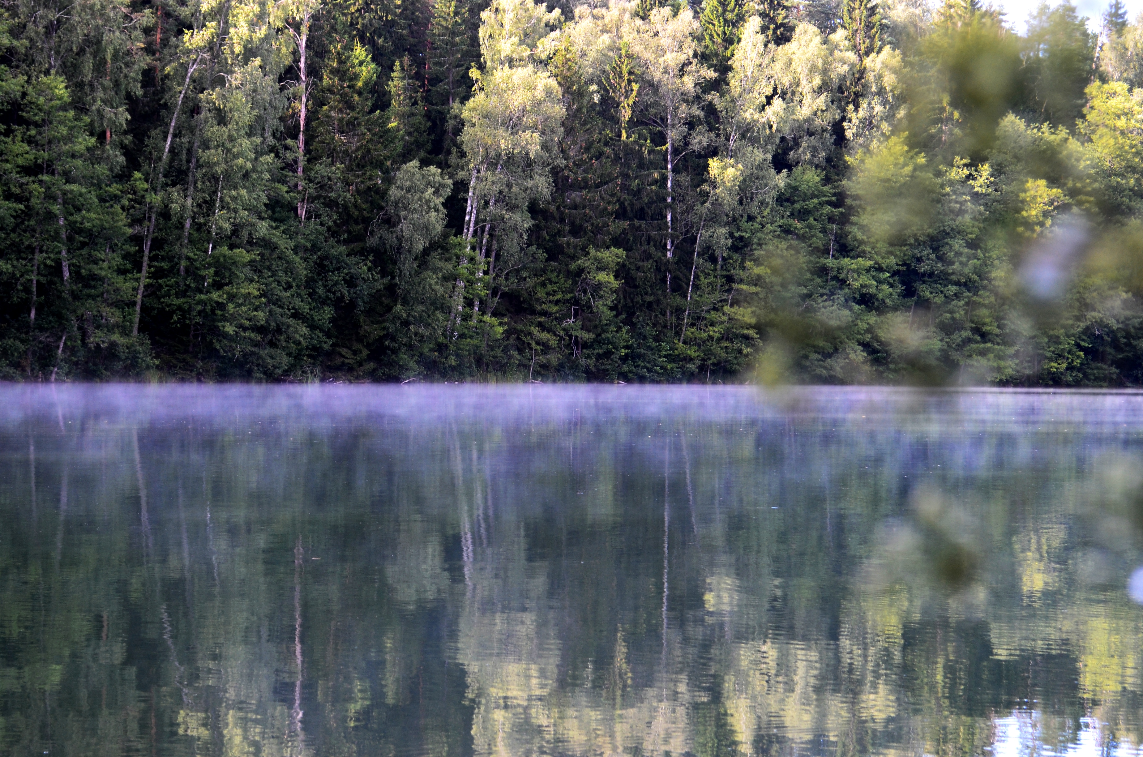 Vaikščiuko ežeras, Mindūnų sen., Molėtų raj.